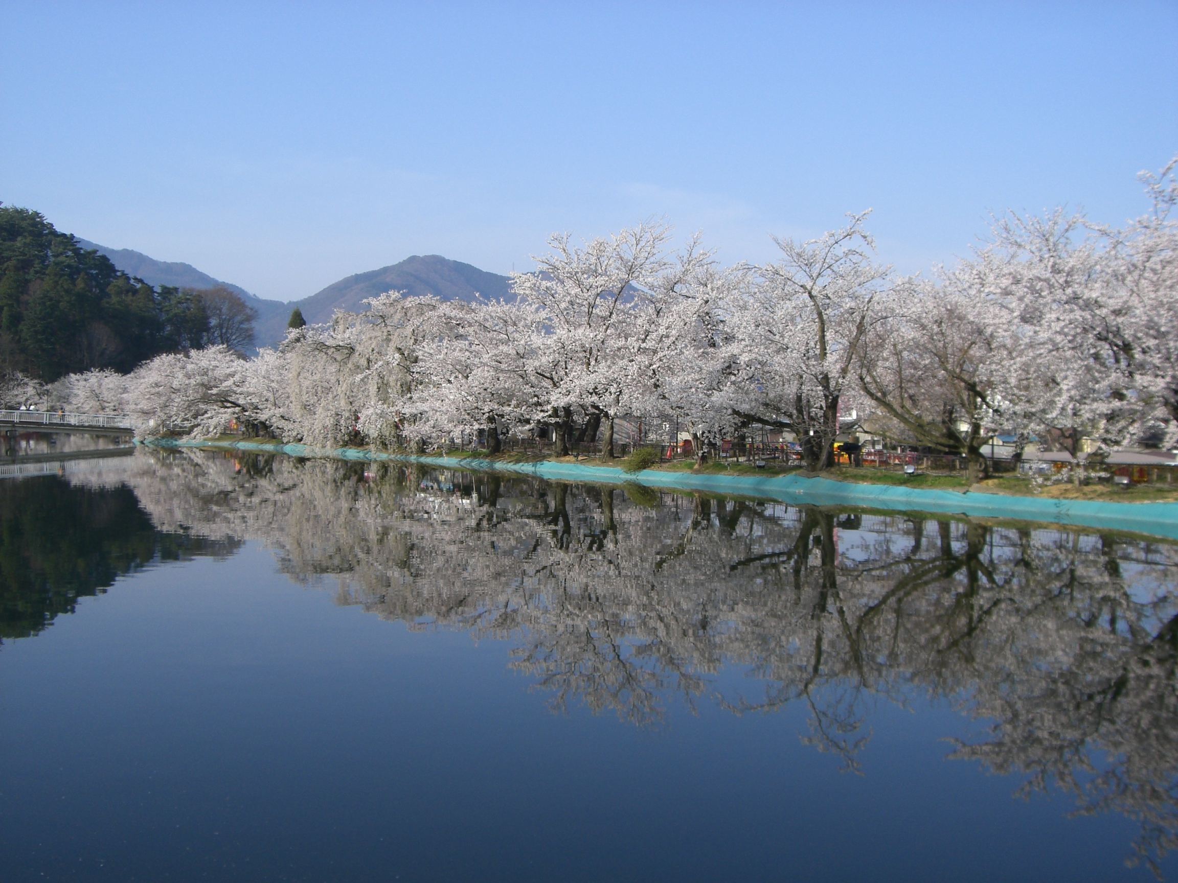 「さくら名所100選」の1つ、長野県須坂市の臥竜公園の桜。